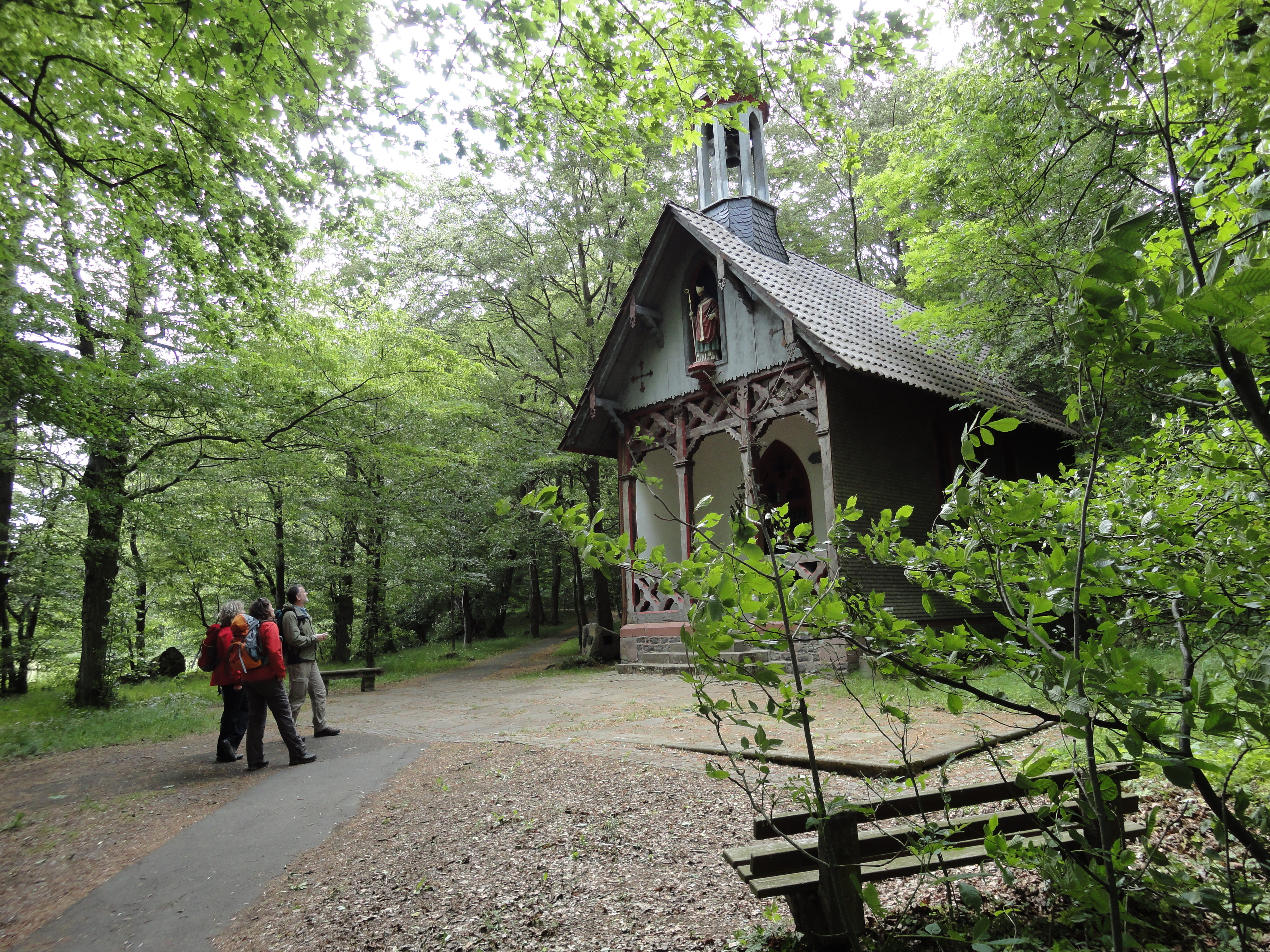 Rastmöglichkeit vor der Kreuzkapelle nördlich von Herbstein am Wanderweg Felsentour